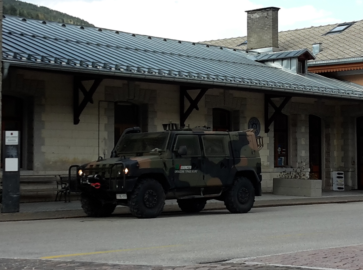 Lince presso la stazione di Dobbiaco